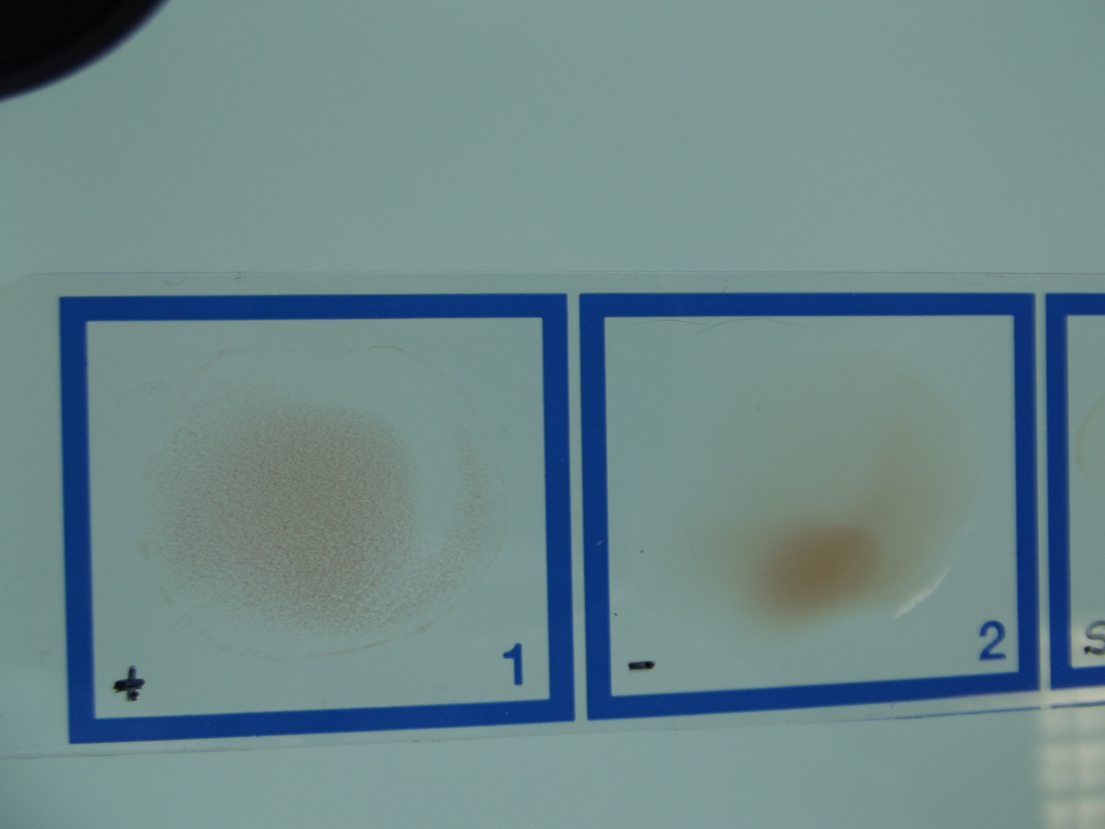 test d'agglutination pour le diagnostic de la mononucléose infectieuse (sérologie)